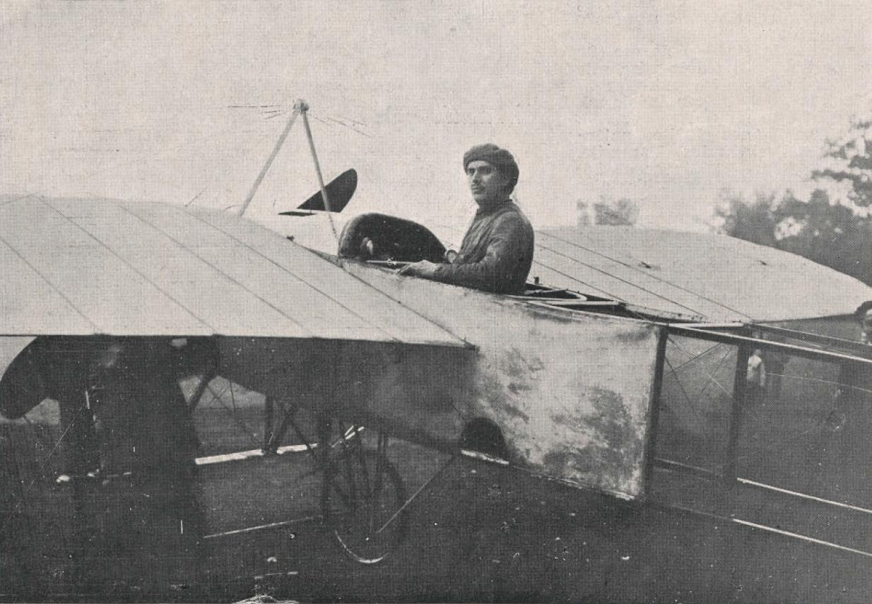 «Acevedo en su monoplano Blériot, en "pose" para el fotógrafo». Luis Alberto Acevedo Acevedo (Santiago, 23 de septiembre de 1885 - San Pedro de la Paz, 13 de abril de 1913),1 fue un aviador y ciclista chileno, considerado uno de los pioneros y primer mártir de la aeronáutica de su país.